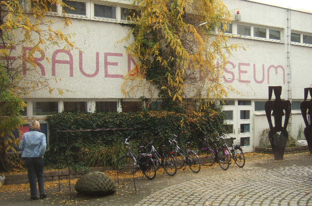 Frauenmuseum, Im Krausfeld, Bonn